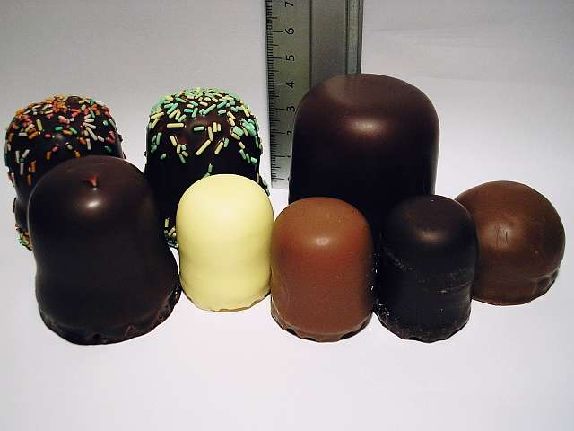 Partyzoen, Negerzoen, Paaszoen, Mini- en Super Dickmann's en Mallo of Melo Cake. Collectie Wikipedia, maart 2006 Creative Commons - Attribution (CC-By) Categorie:Afbeelding_cacao Categorie:Afbeelding_gebak Categorie:Afbeelding_snoep